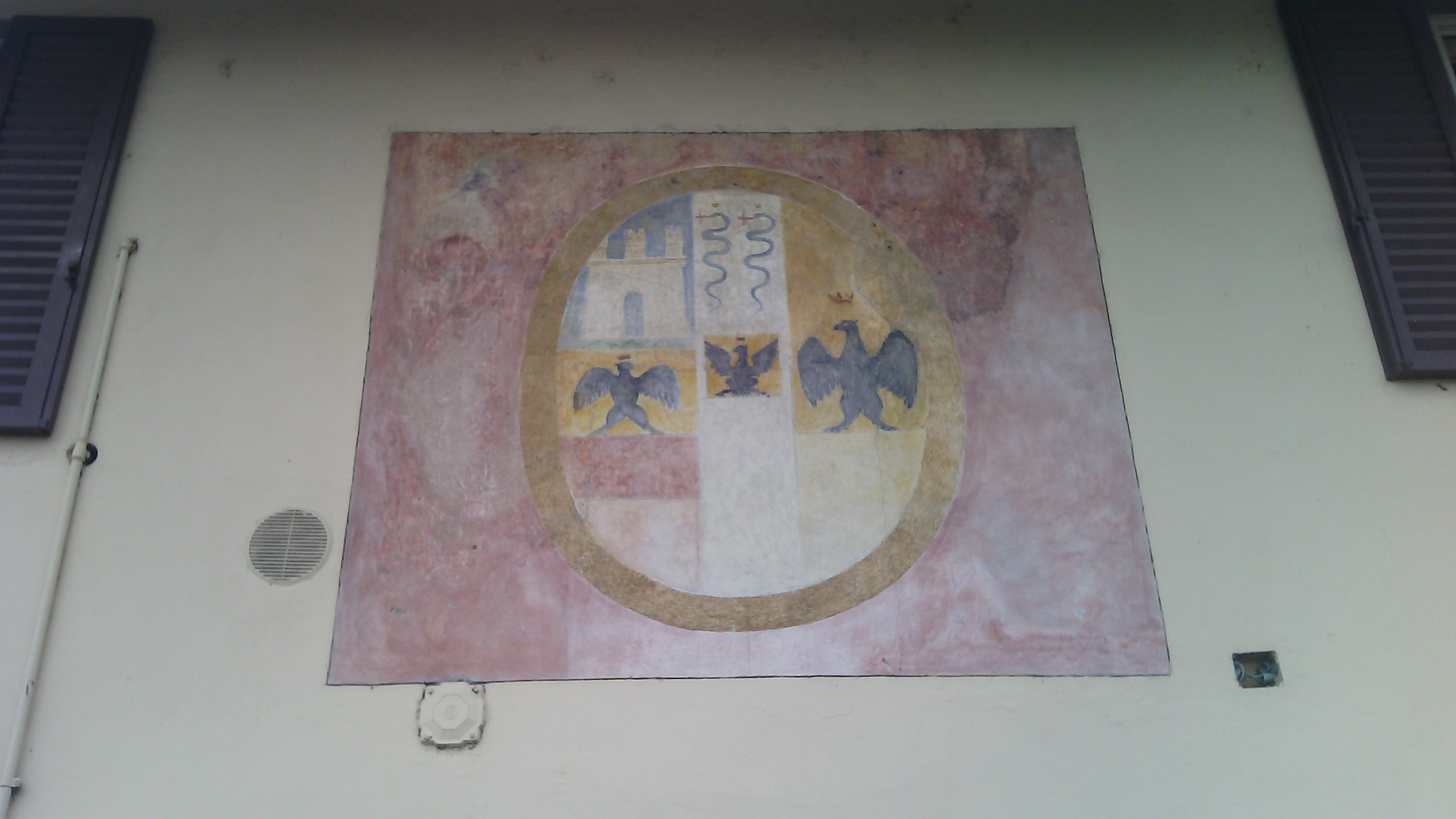 Stemma della famiglia Carena dipinto sulla loro casa a Boffalora sopra Ticino (MI) - Italy